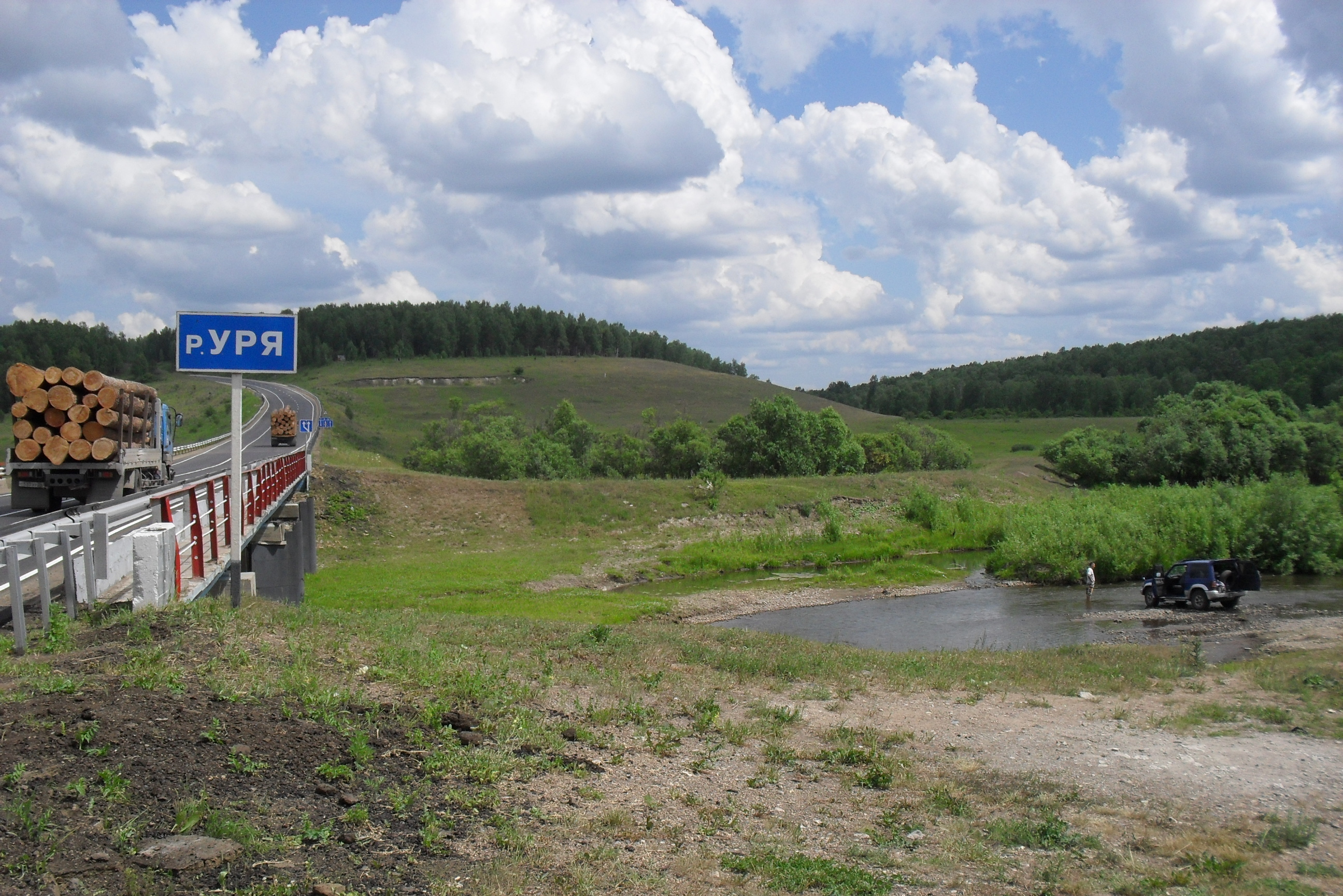 Река Уря